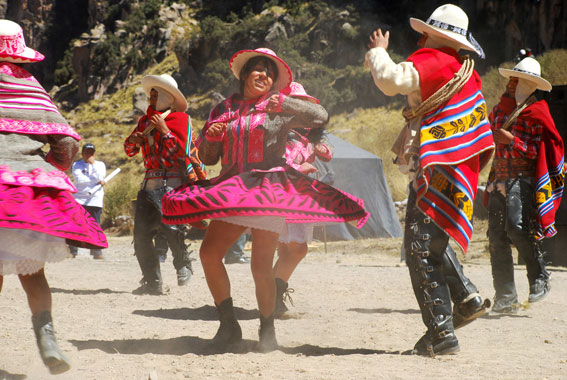 Danza costumbrista de la provincia de Espinar - cusco, los trajes y los movimientos son originarios del distrito de Pichigua, la cual pertenece a Espinar